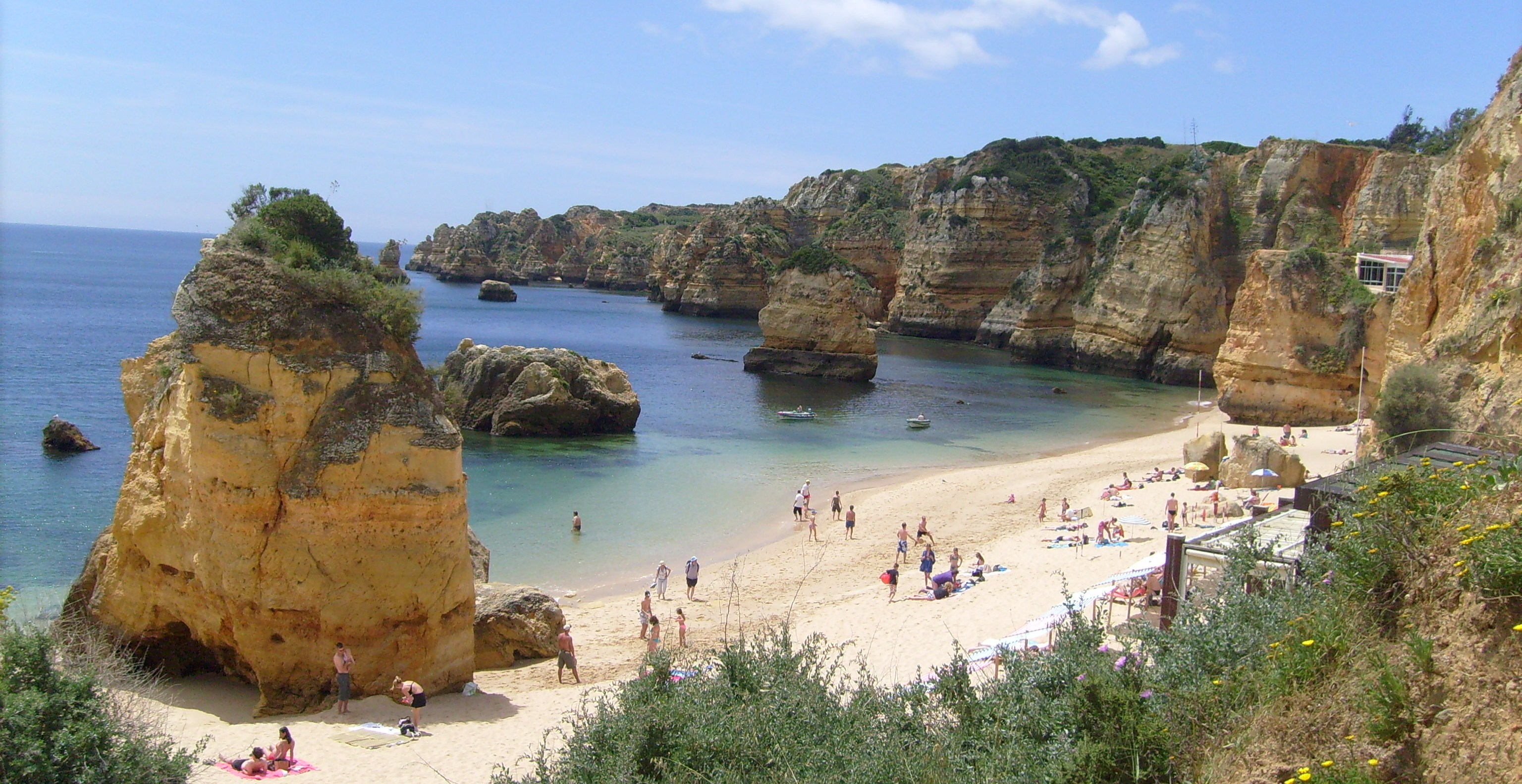 Der berühmte Sandstrand Praia da Dona Ana nahe Lagos